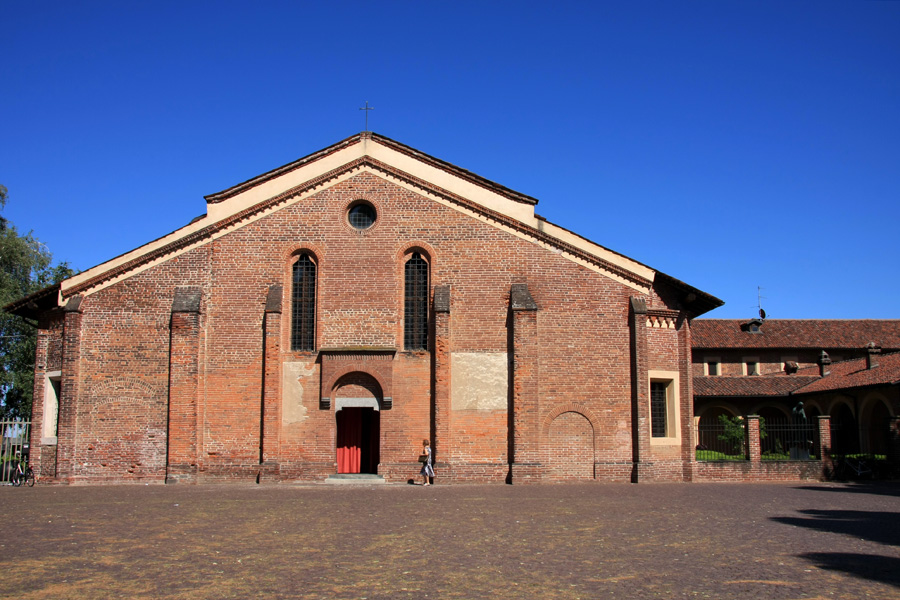 Facciata della Chiesa di San Nazzaro della Costa a Novara con l'annesso Convento a lato